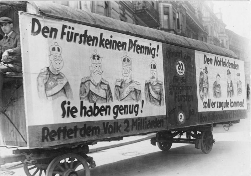 Wahlpropaganda 1926 "Den Fürsten keinen Pfennig! Sie haben genug! Rettet dem Volk 2 Milliarden Den Notleidenden soll es zugute kommen! Stimmt am 20. Juni für die Enteignung der Fürsten. Stimmt mit ja" Information added by Wikimedia users.